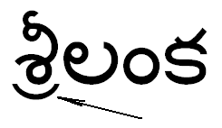 крарапади